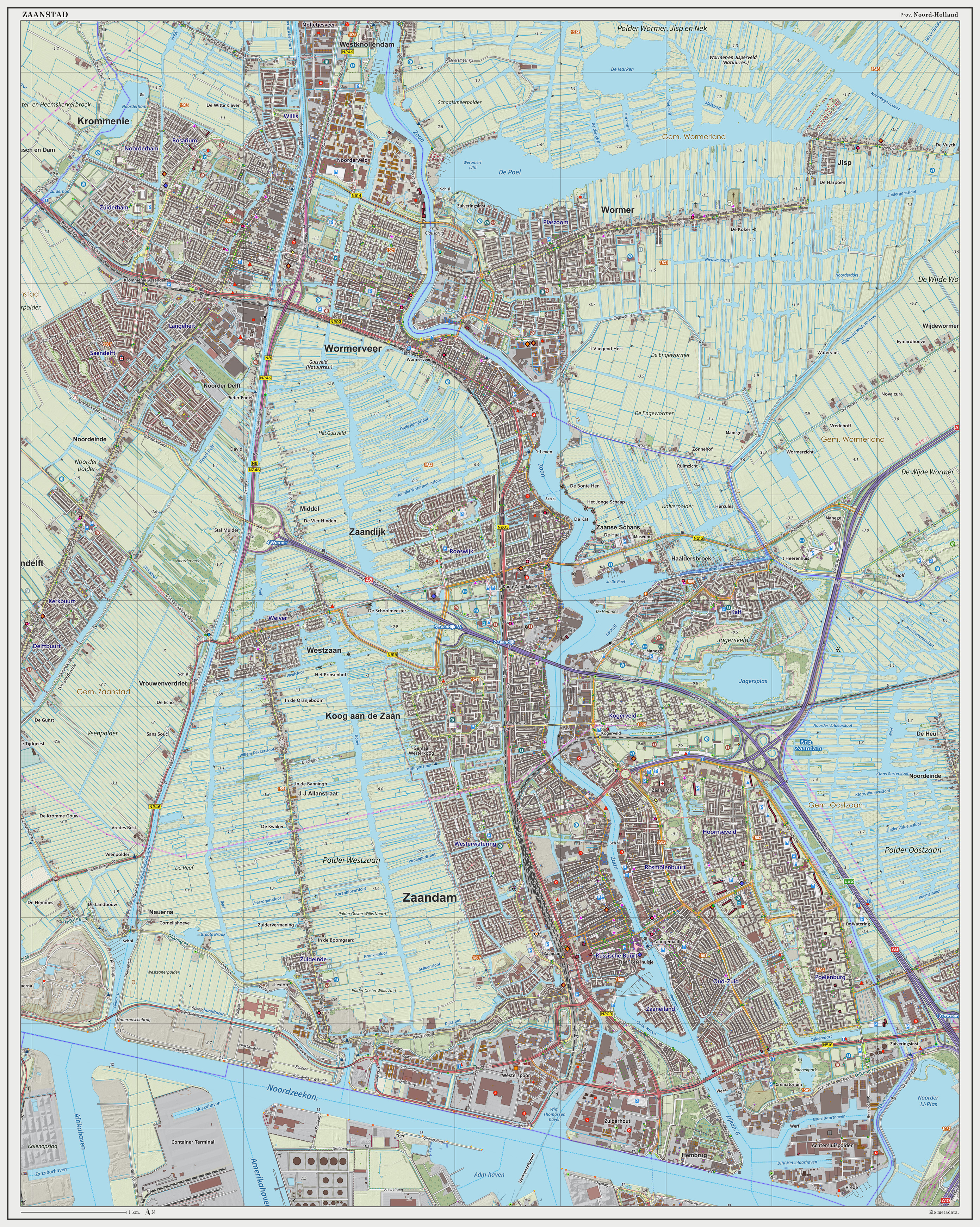 Topografische kaart van Zaanstad (woonplaats). Resolutie: 300 pixels/km. Kaartbeeld samengesteld uit de open geodata van de Top10NL en Top25namen (Basisregistratie Topografie, Kadaster), Creative Commons BY licentie. Gebouwvlakken uit open geodata BAG extract. Wegen uit de OpenStreetMap. Reliëfschaduw uit de Actuele Hoogtekaart AHN2. Samenstelling en kleurenschema: Jan-Willem van Aalst, met QGIS2. Zie ook de Legenda.